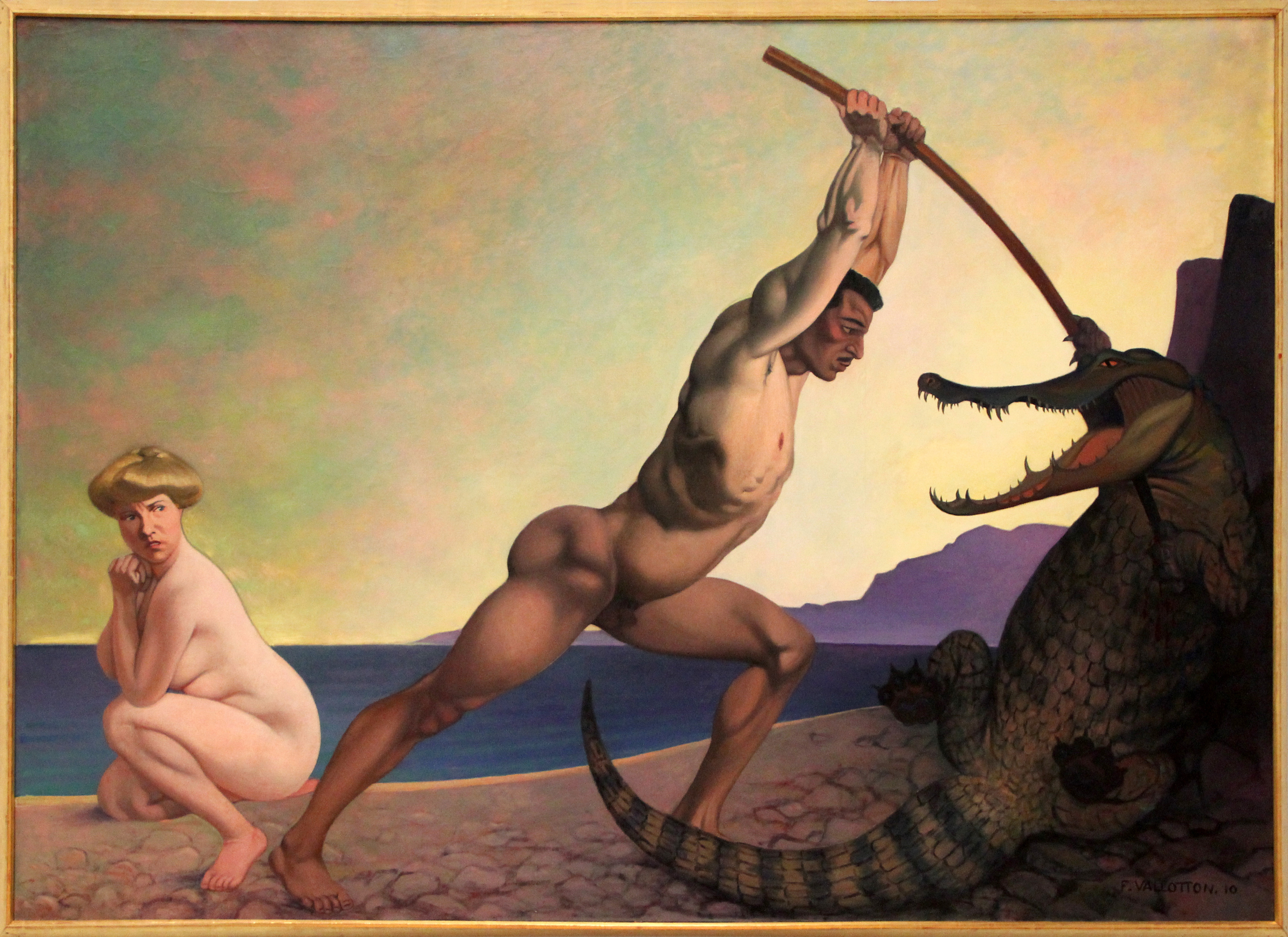 Persée tuant le dragonlabel QS:Lfr,"Persée tuant le dragon"